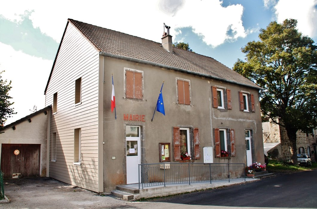 La Mairie